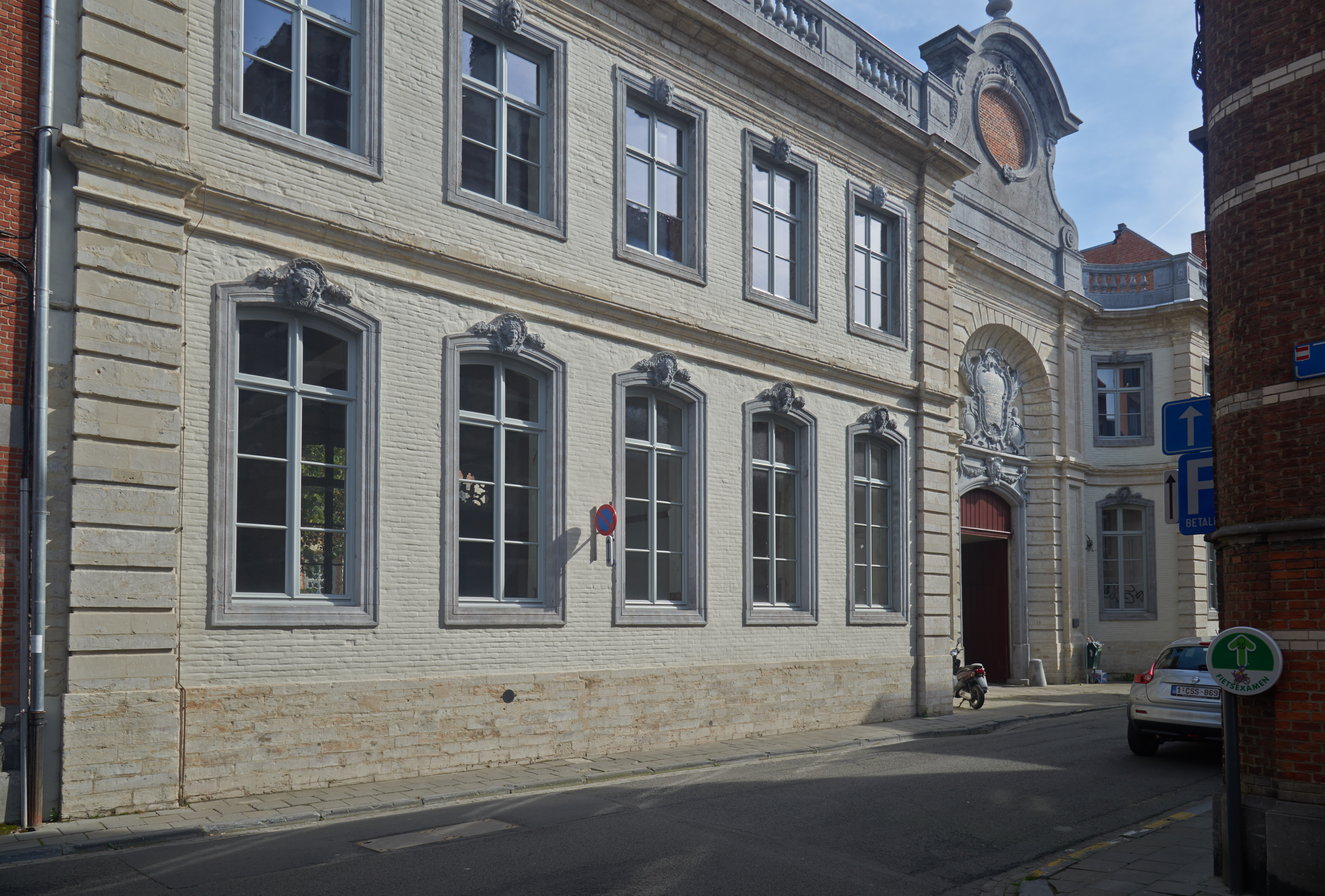 Leuven, Vaartstraat 30-32